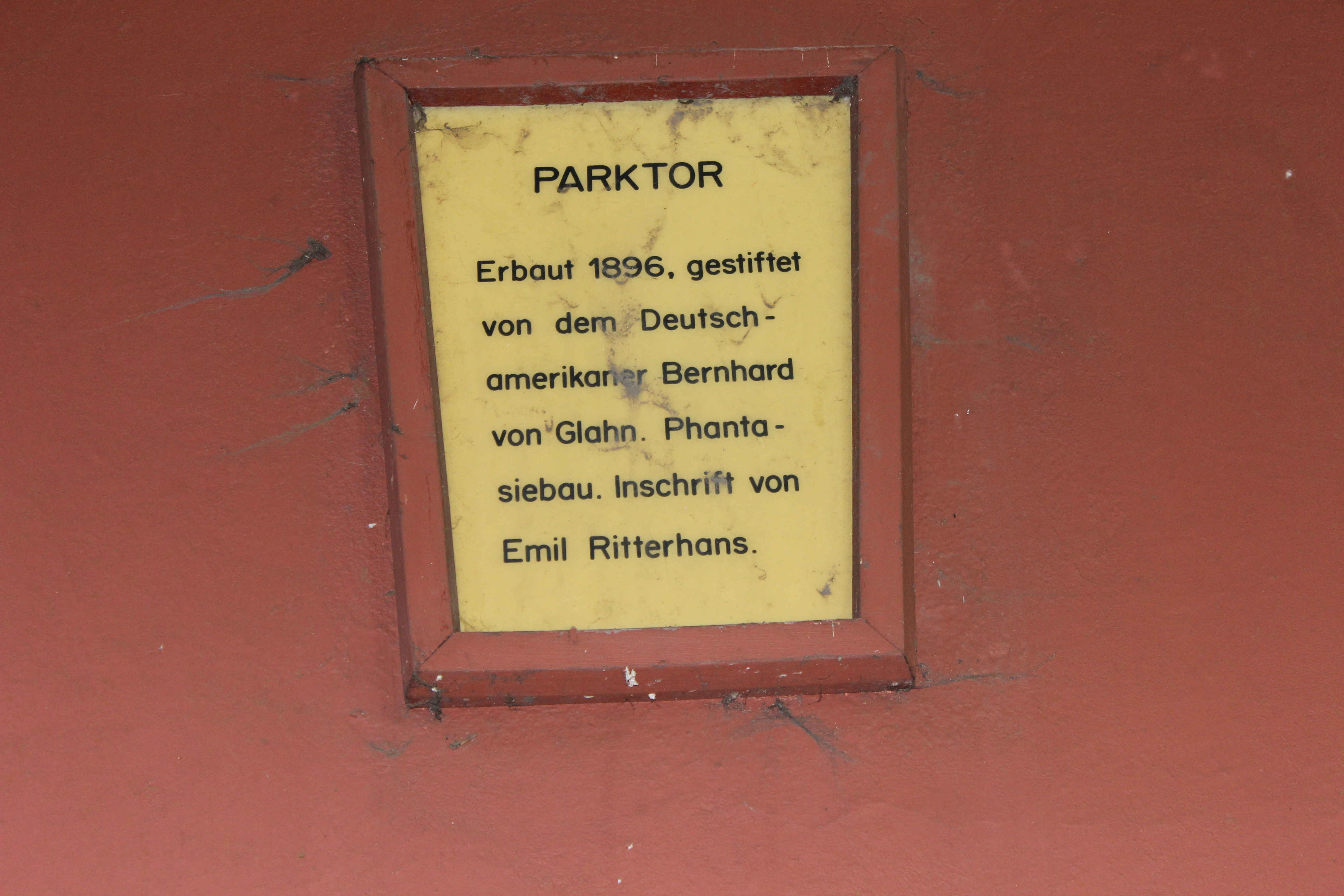 Schild am Parktor Speckenbüttel in Bremerhaven PARKTOR Erbaut 1896, gestiftet von dem Deutschamerikaner Bernhard von Glahn. Phantasiebau. Inschrift von Emil Ritterhans.